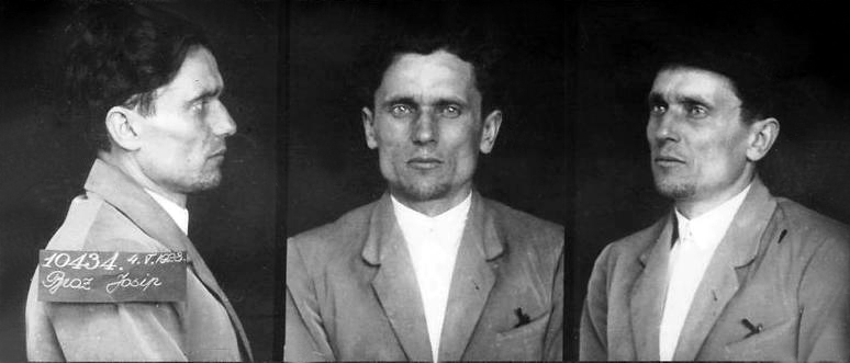 Srpskohrvatski / српскохрватски: Policijski snimak političkog zatvorenika Josipa Broza Tita u zatvoru u Lepoglavi 1928. godine.